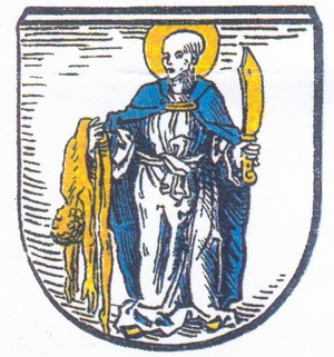 Herb Kębłowa